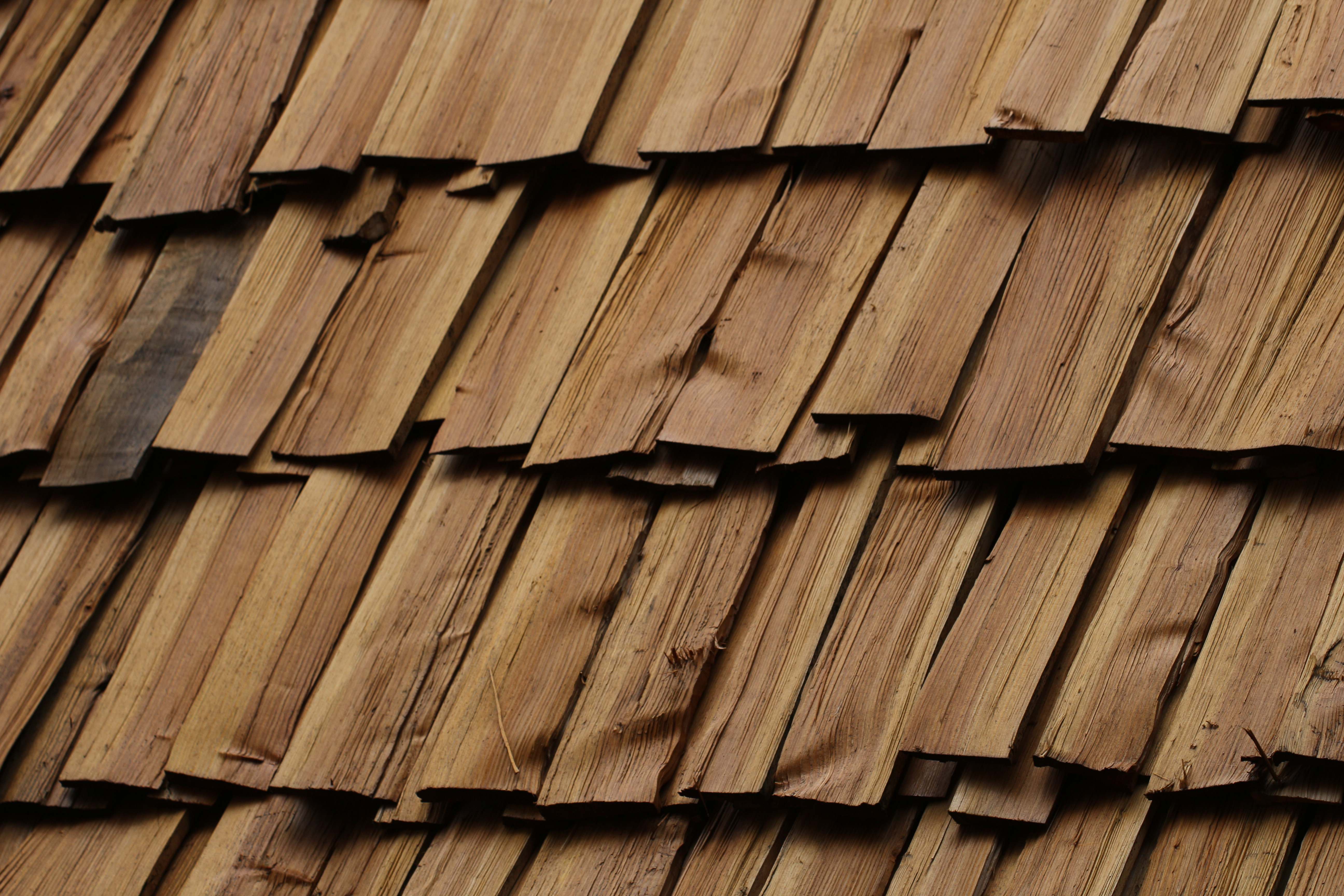 France - Yonne - Château de Guédelon - Toit en bardeaux 5 (ext.)